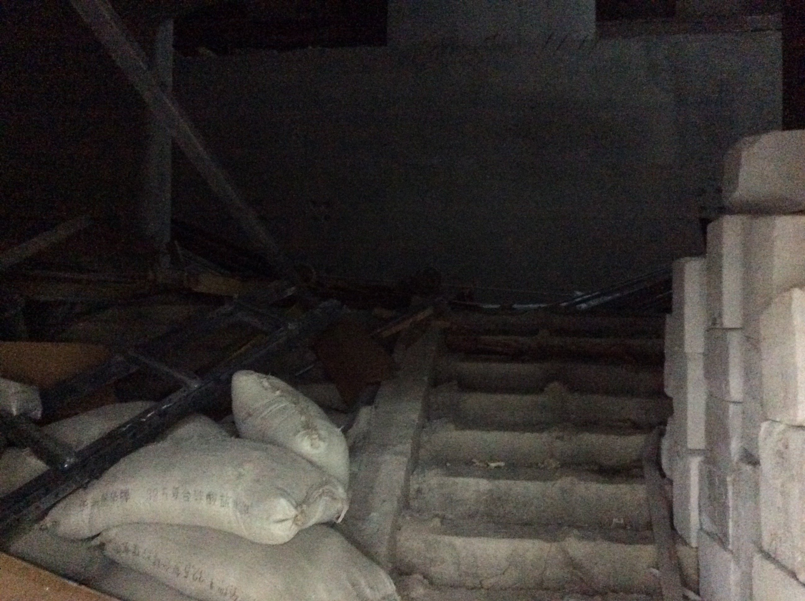 中文（中国大陆）: 武汉地铁复兴路预留换乘通道